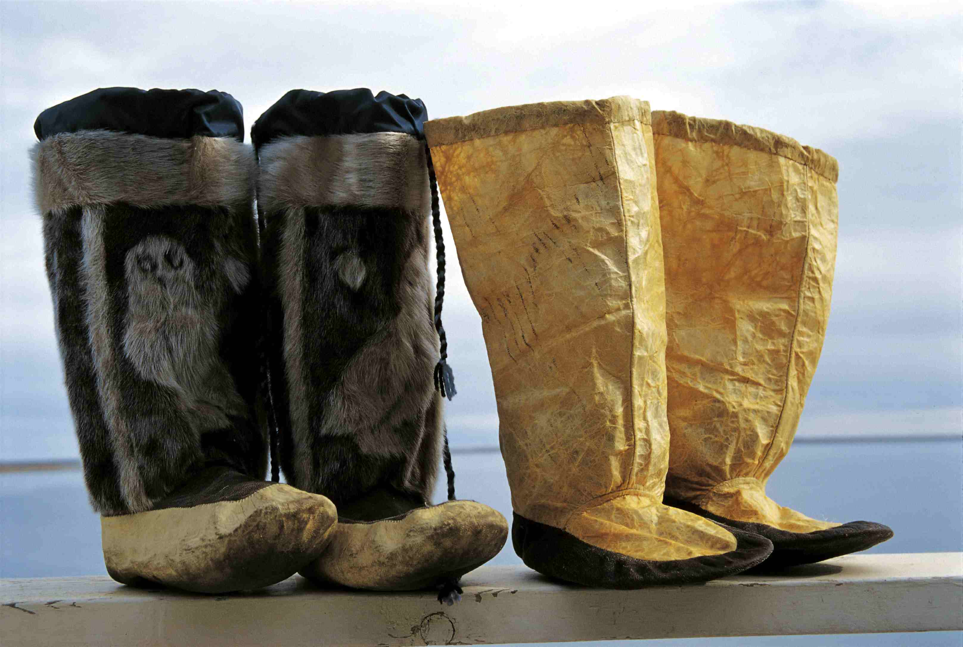 Inuit Boots (2002)